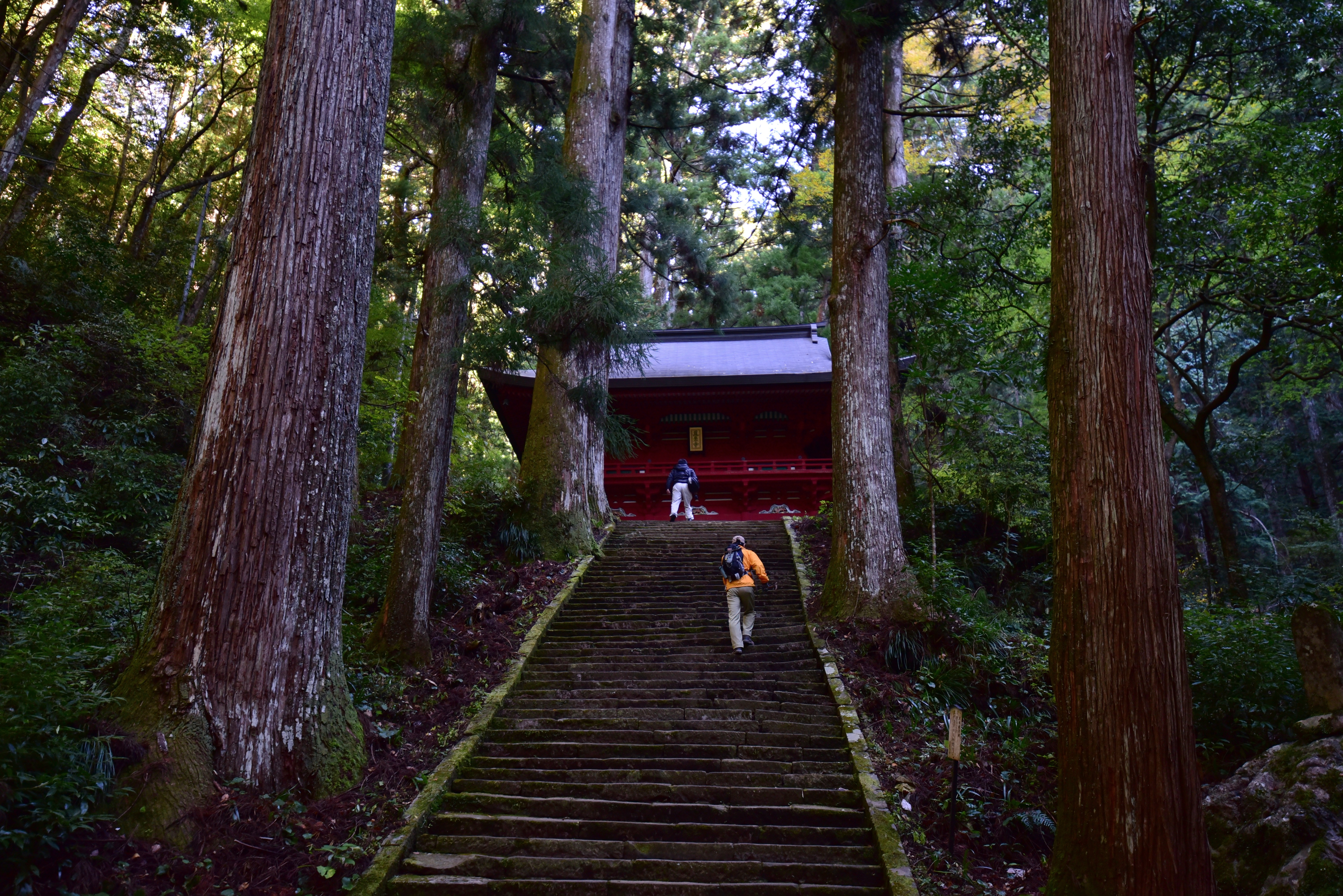 鳳来寺の仁王門